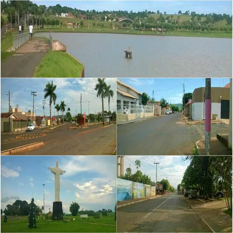 Montagem sobre Quirinópolis, Goiás, Brasil